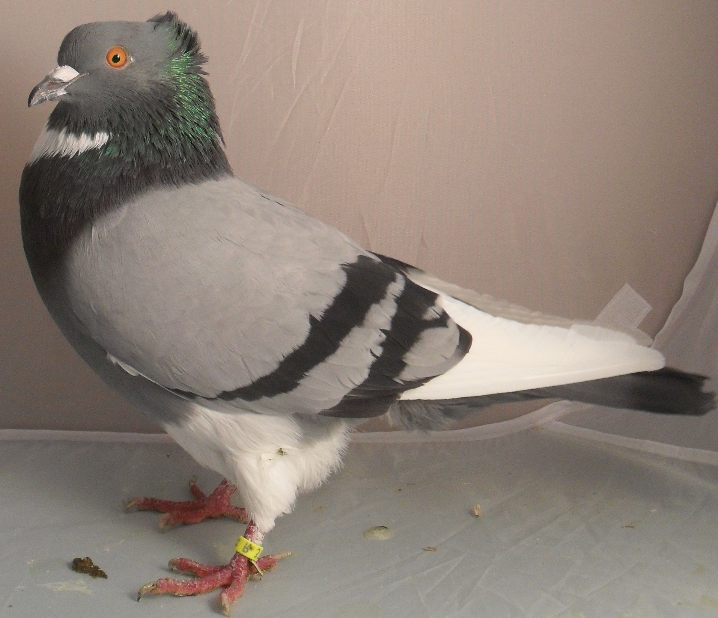 Belgier blau